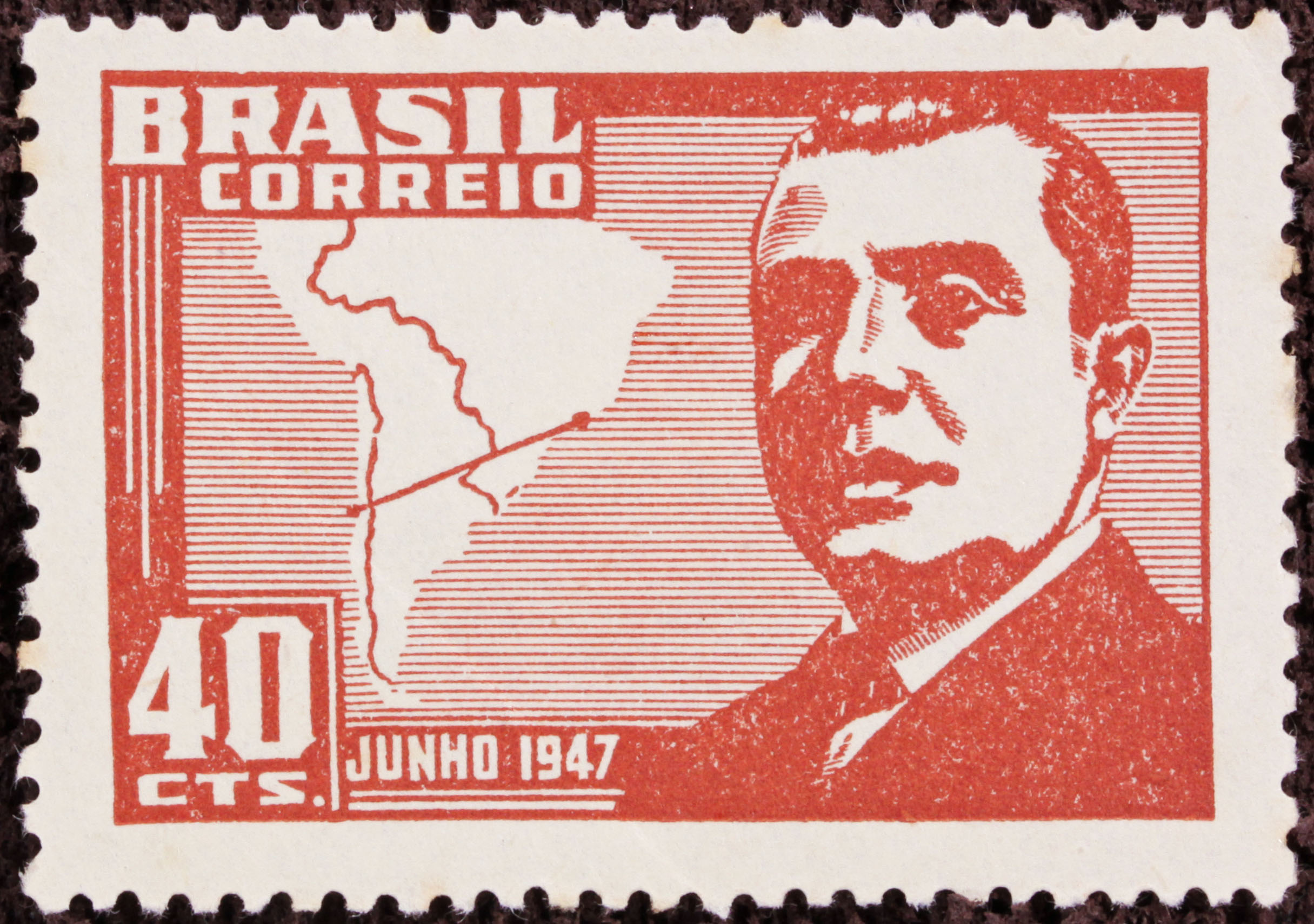 Selo Comemorativo da Visita do Presidente do Chile Gabriel González Videla - Junho de 1947 - Castanho